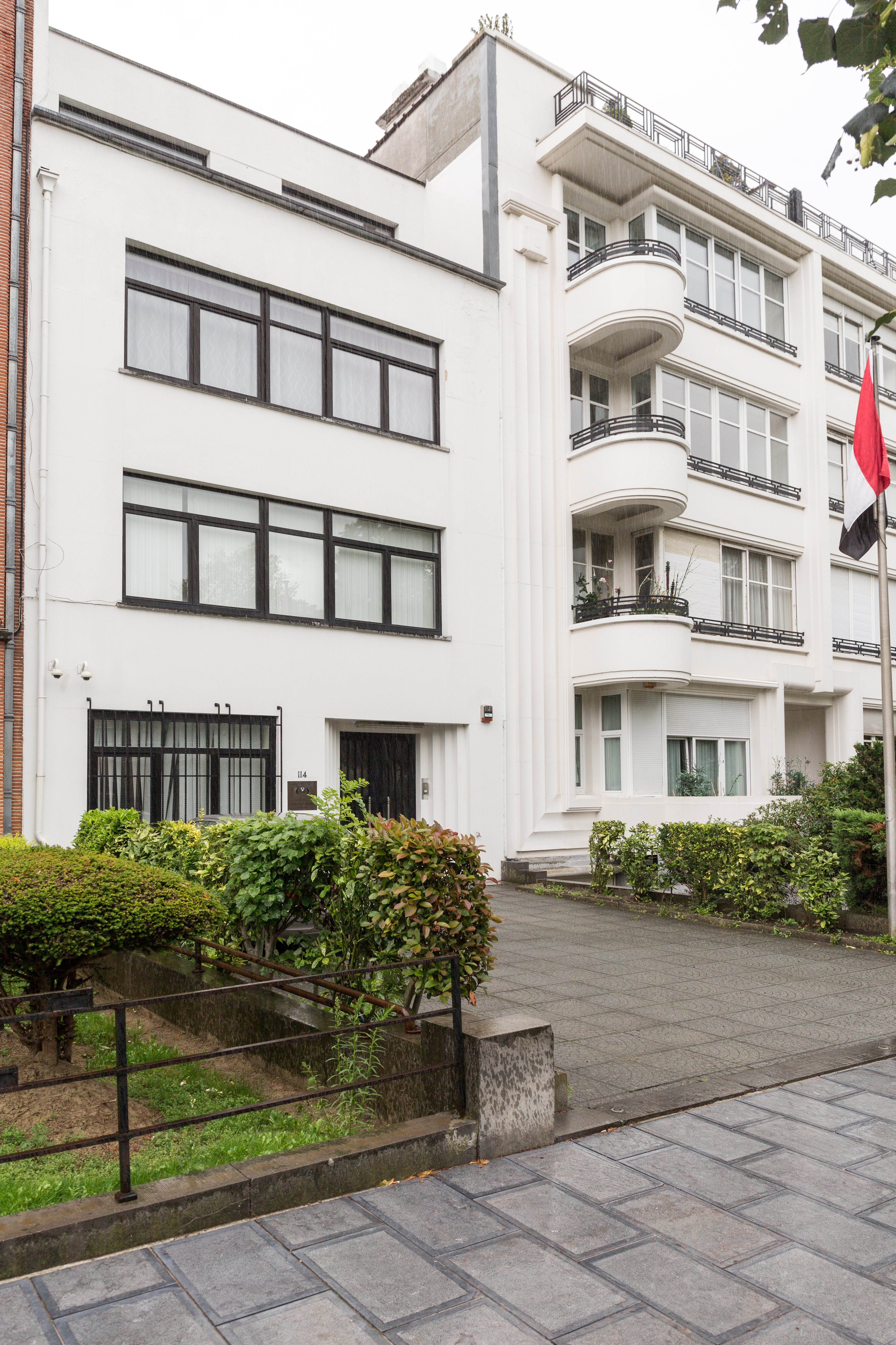 Ambassade du Yémen en Belgique, Avenue Franklin Roosevelt 114, Bruxelles.